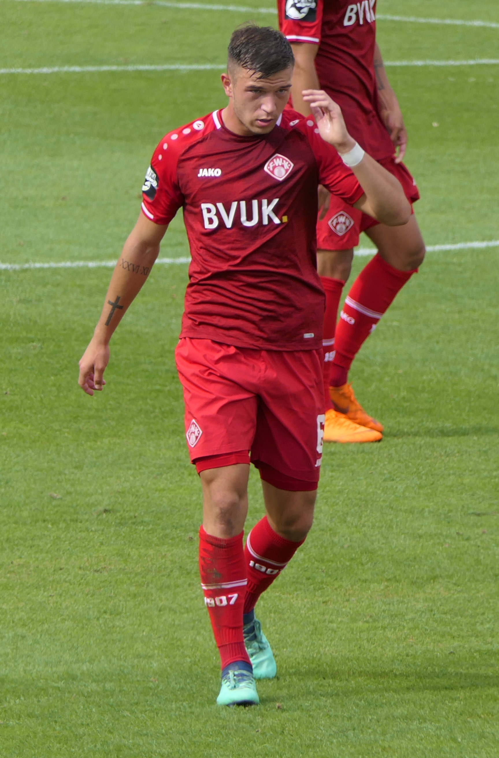 Der Fussballprofi Kai Wagner im Trikot der Würzburger Kickers beim Heimspiel gegen Eintracht Braunschweig am 22.09.2018.